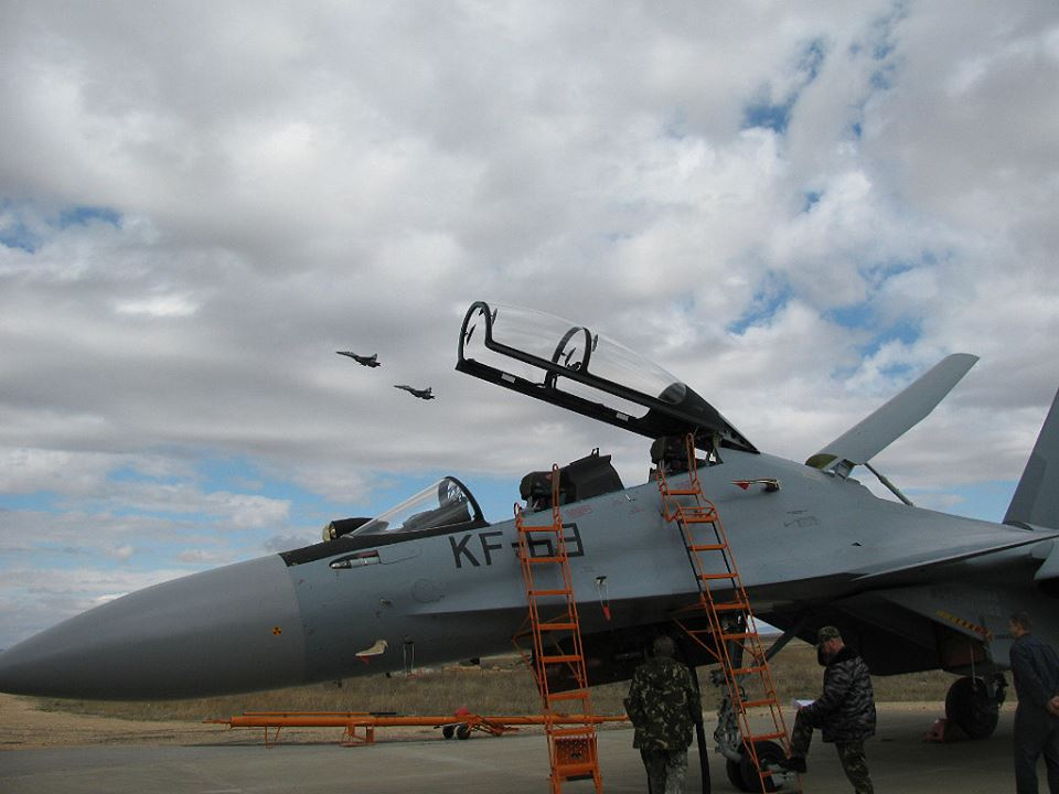 Avion de chasse Soukhoï Su-30MKA de l'armée de l'air algérienne.